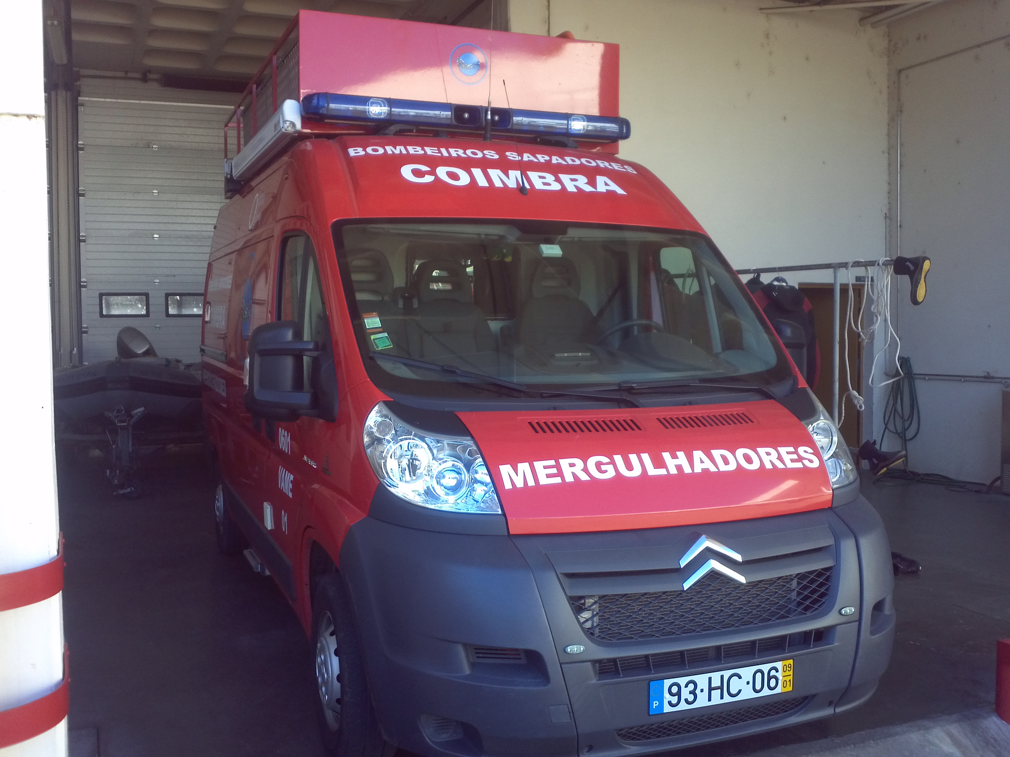 Veículo de Apoio a Mergulhadores 01